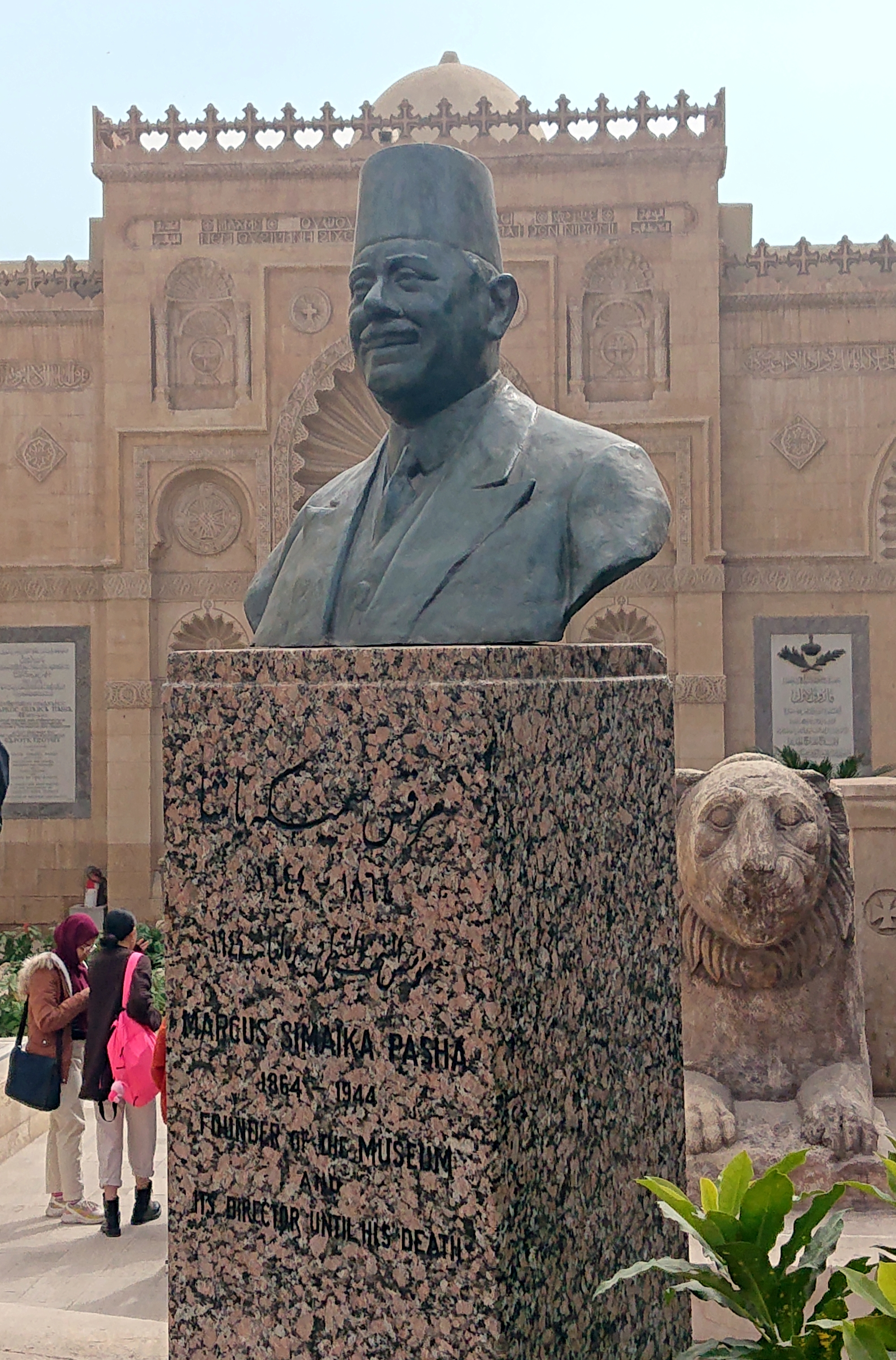 Gedenkstein für den Gründer des Kopt. Museums in Kairo